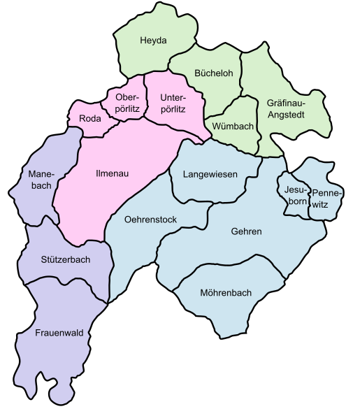 Stadtteile Ilmenau